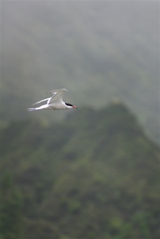 Sterna hirundo caspia - Garajau Lagoa do Fogo, ilha de São Miguel, Arquipélago dos Açores, Portugal Garajau 3